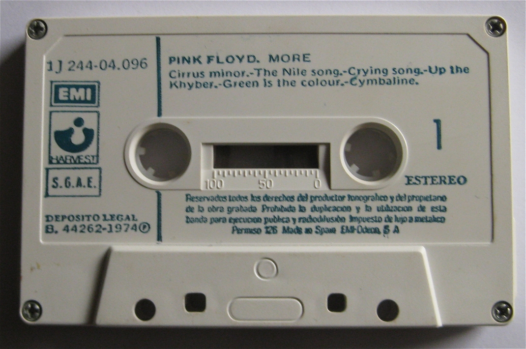 MC des Albums More, Made in Spain